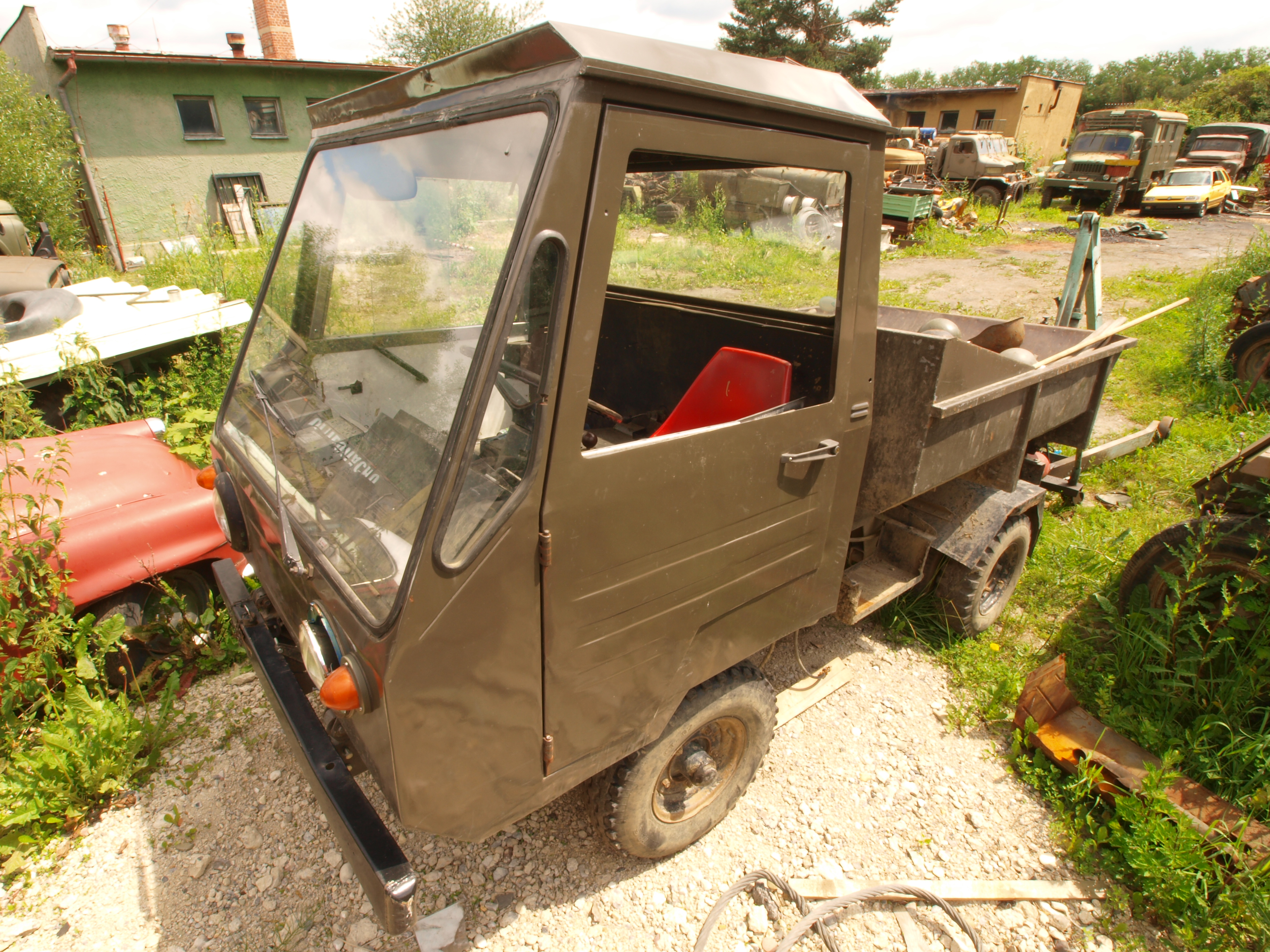 Multicar M25